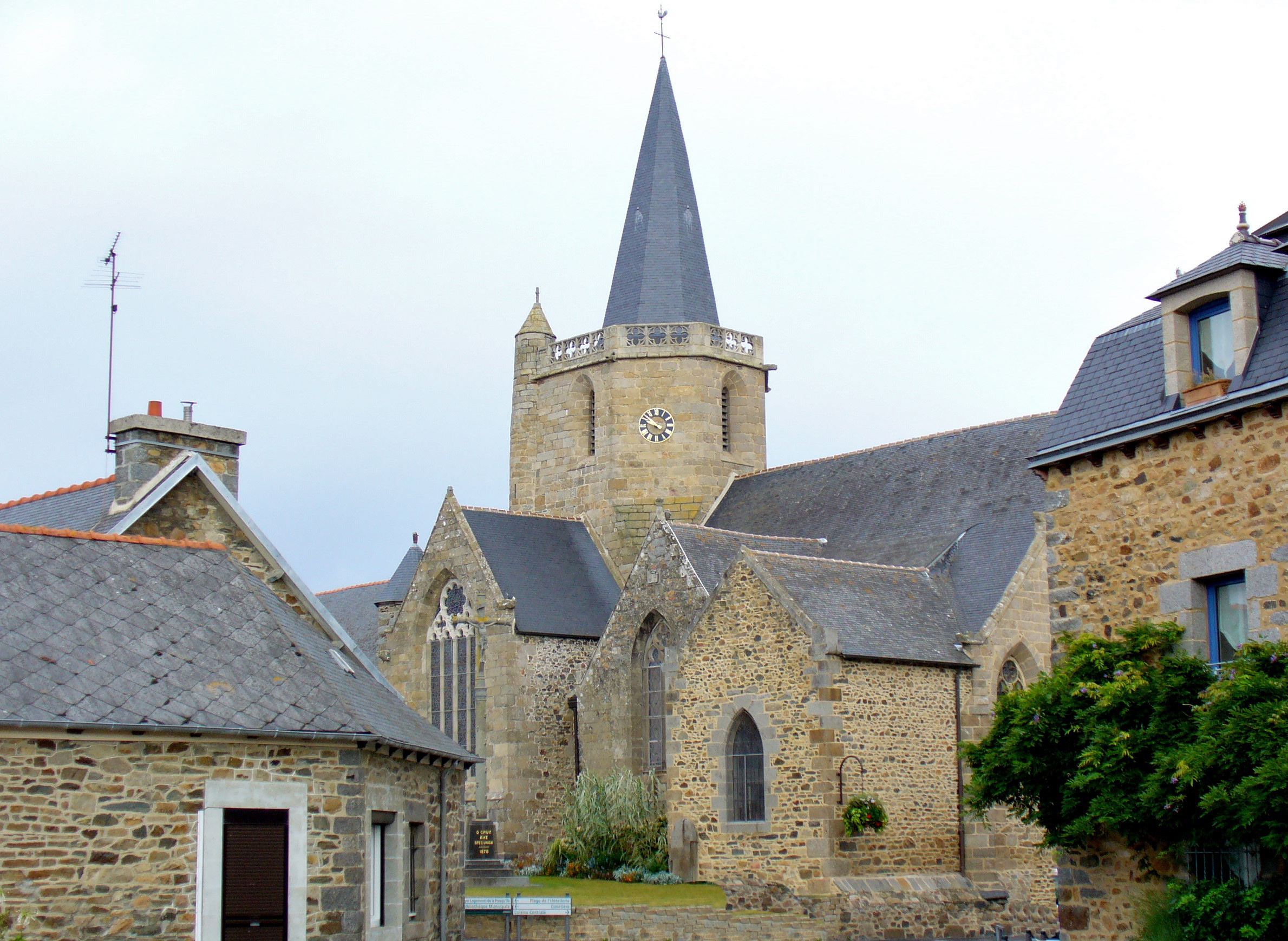 Iliz Hilion.